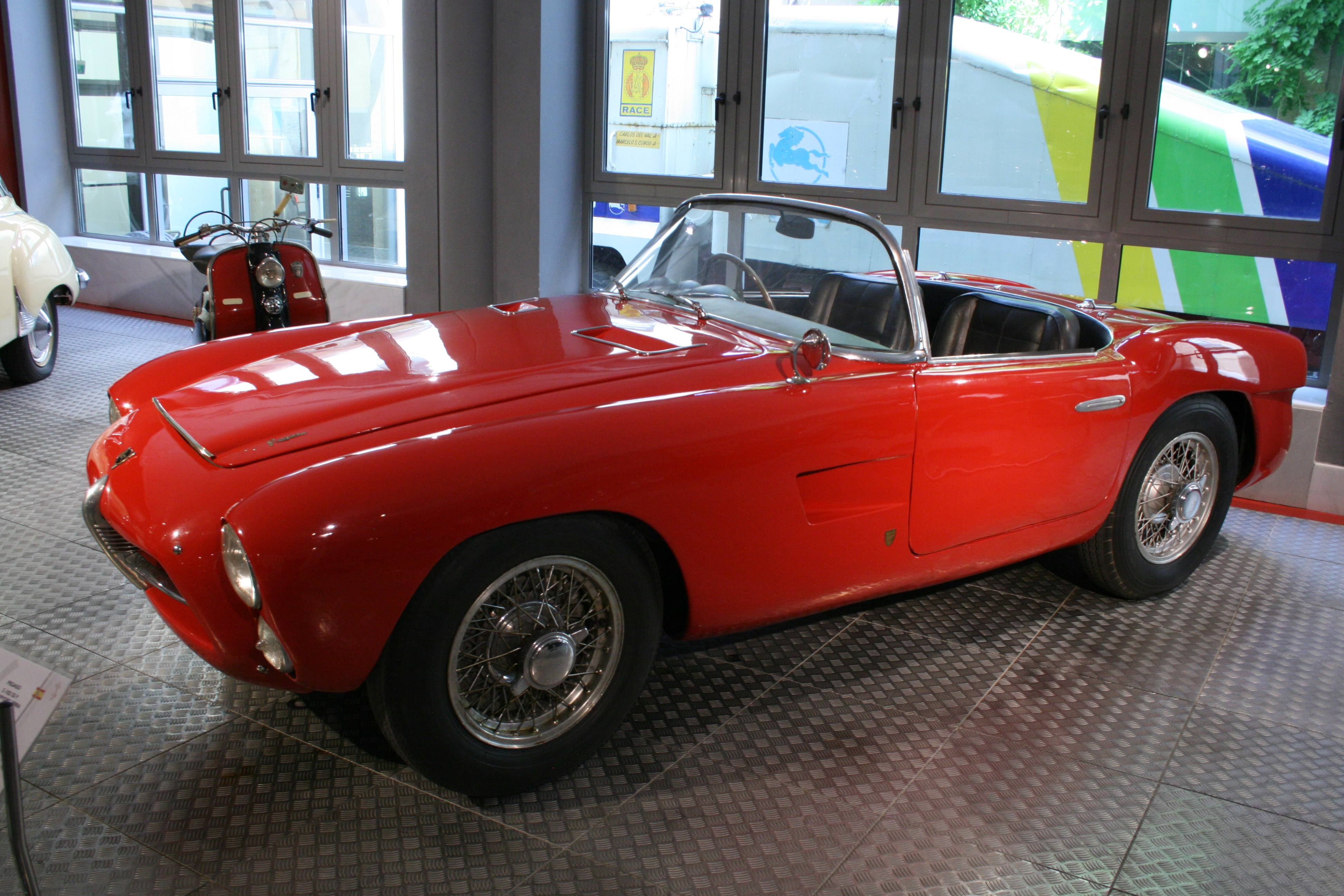 Pegaso Z-102 SS P Museo de Historia de la Automoción de Salamanca Native nameMuseo de Historia de la Automoción (Salamanca)LocationSalamanca, (Spain)Coordinates40° 57′ 29.73″ N, 5° 40′ 00.95″ W Established2002Web page control : Q6034050 institution QS:P195,Q6034050